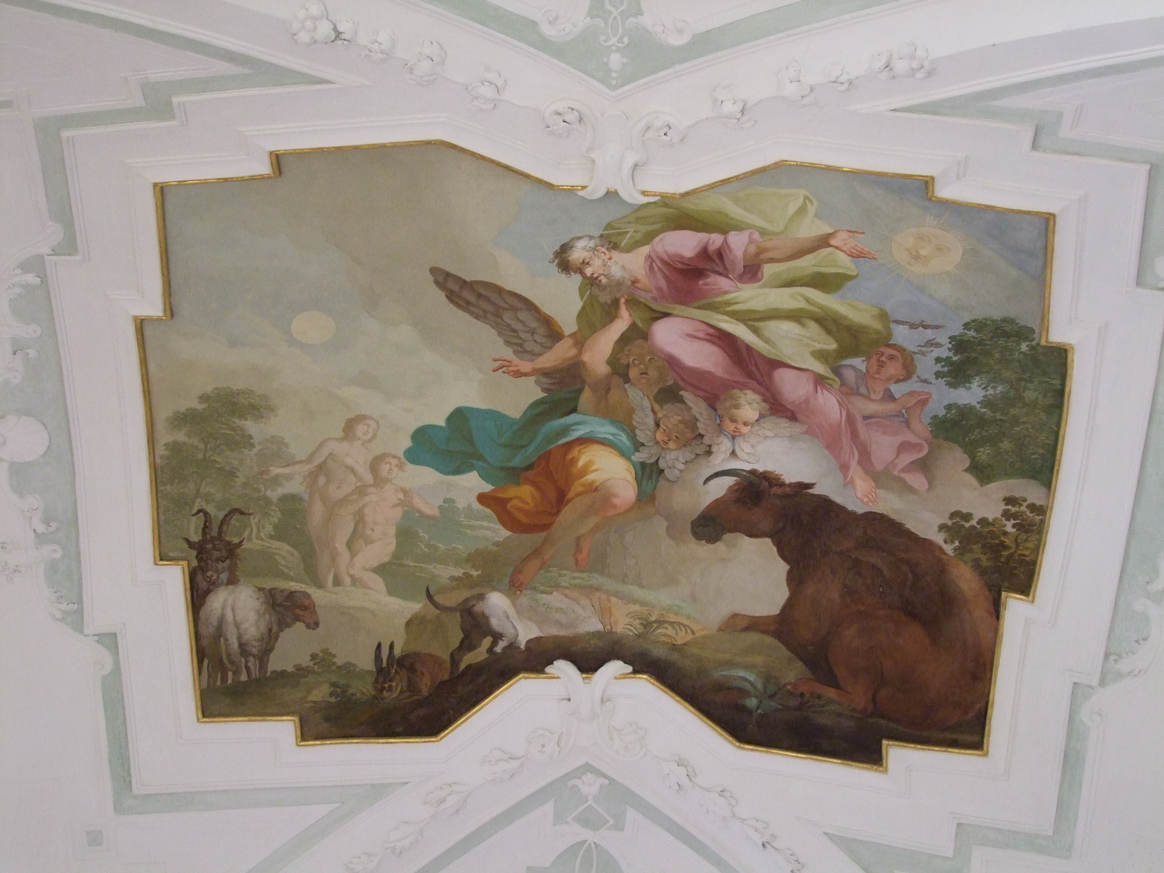 St. Georg, ehemalige Klosterkirche des oberschwäbischen Klosters Ochsenhausen